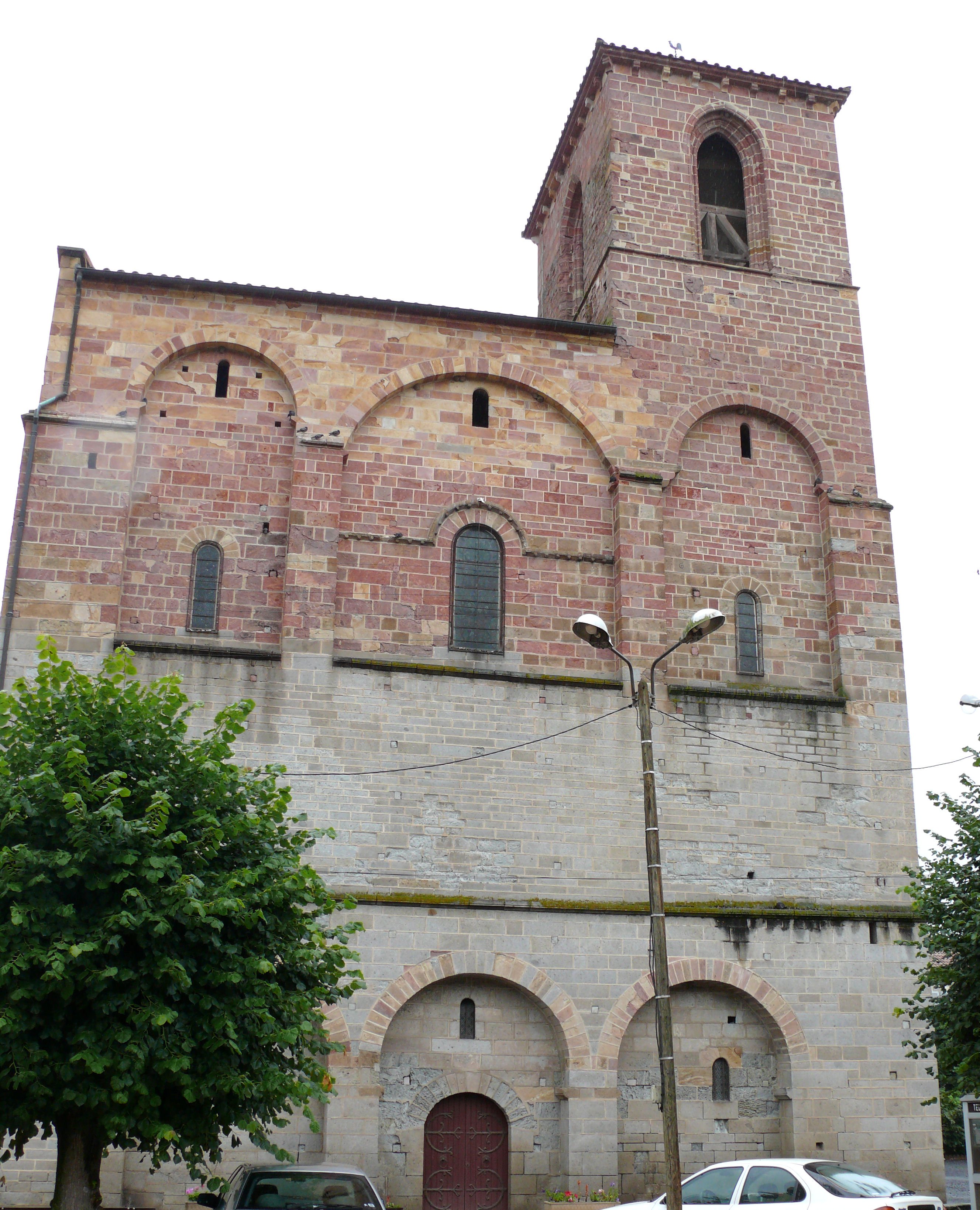 Manglieu - Abbatiale Saint-Sébastien - Porche occidental avec le clocher